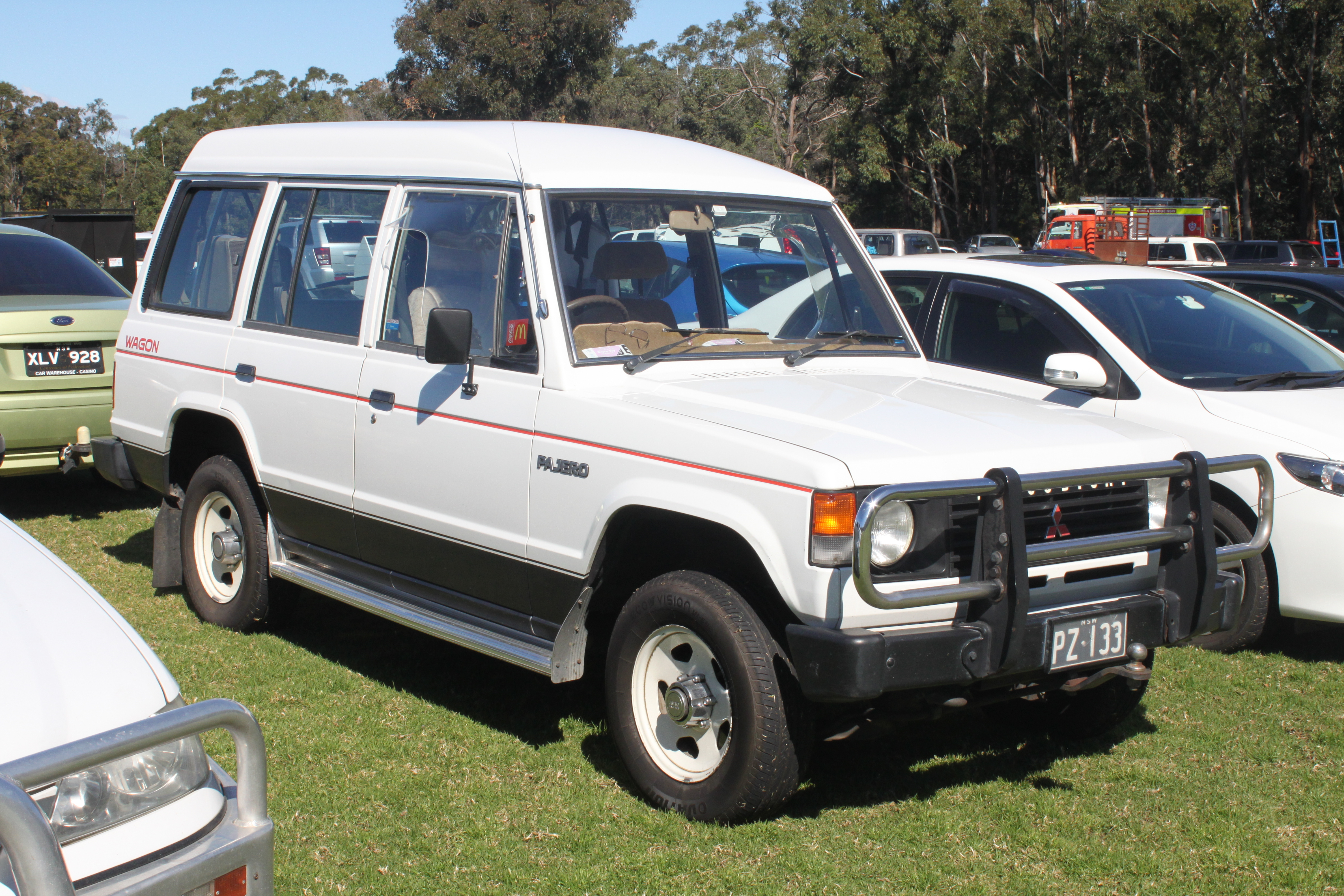 Mitsubishi Pajero NB Super LWB